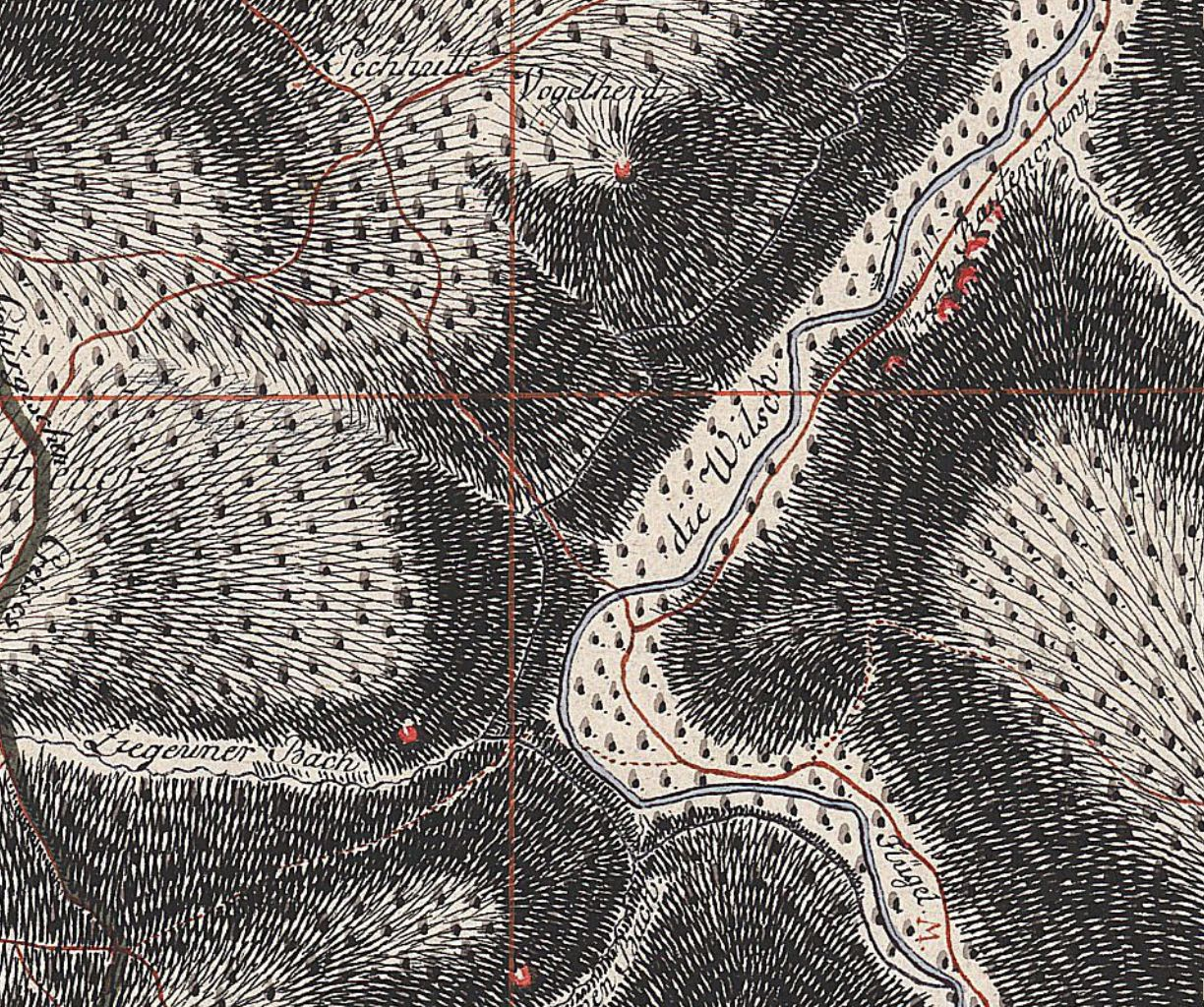 Wilzsch: Ausschnitt aus Blatt 220 der Sächsischen Meilenblätter im Berliner Exemplar von 1791. Einmündung des Zigeunerbachs in die Wilzsch. Die Siedlung Neues Wiesenhaus ist noch nicht eingezeichnet.Hinweis: Karte ist nicht genordet. Karte in der Staats- und Universitätsbibliothek Dresden